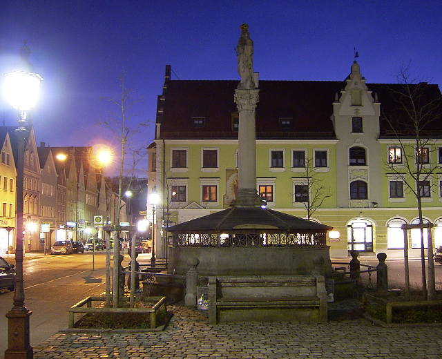 Der Marienplatz in Mindelheim am frühen Abend